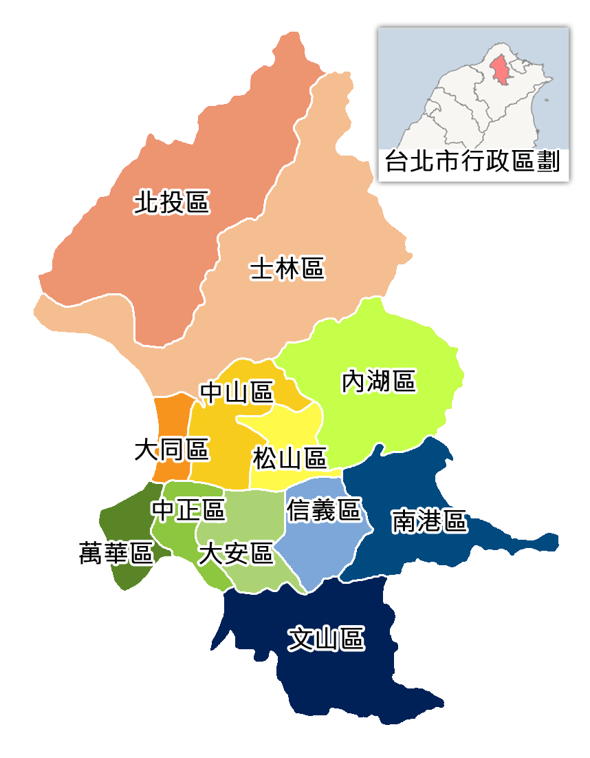 臺北市行政區劃 Bân-lâm-gú: Tâi-pak-tshī hîng-tsìng khu-ue̍h. 臺北市行政區劃。